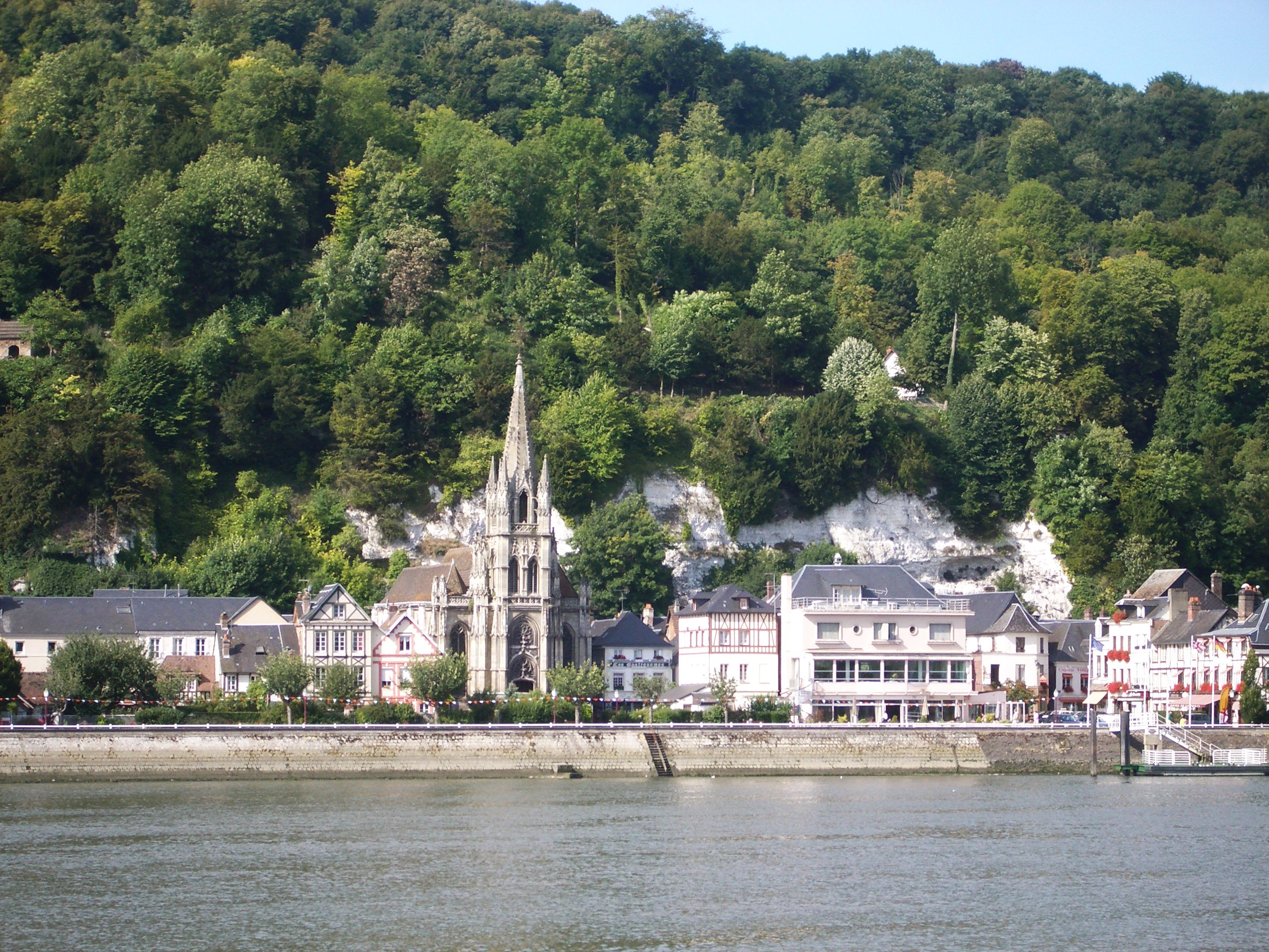 Le village de La Bouille (Seine Maritime) vu de l'autre rive